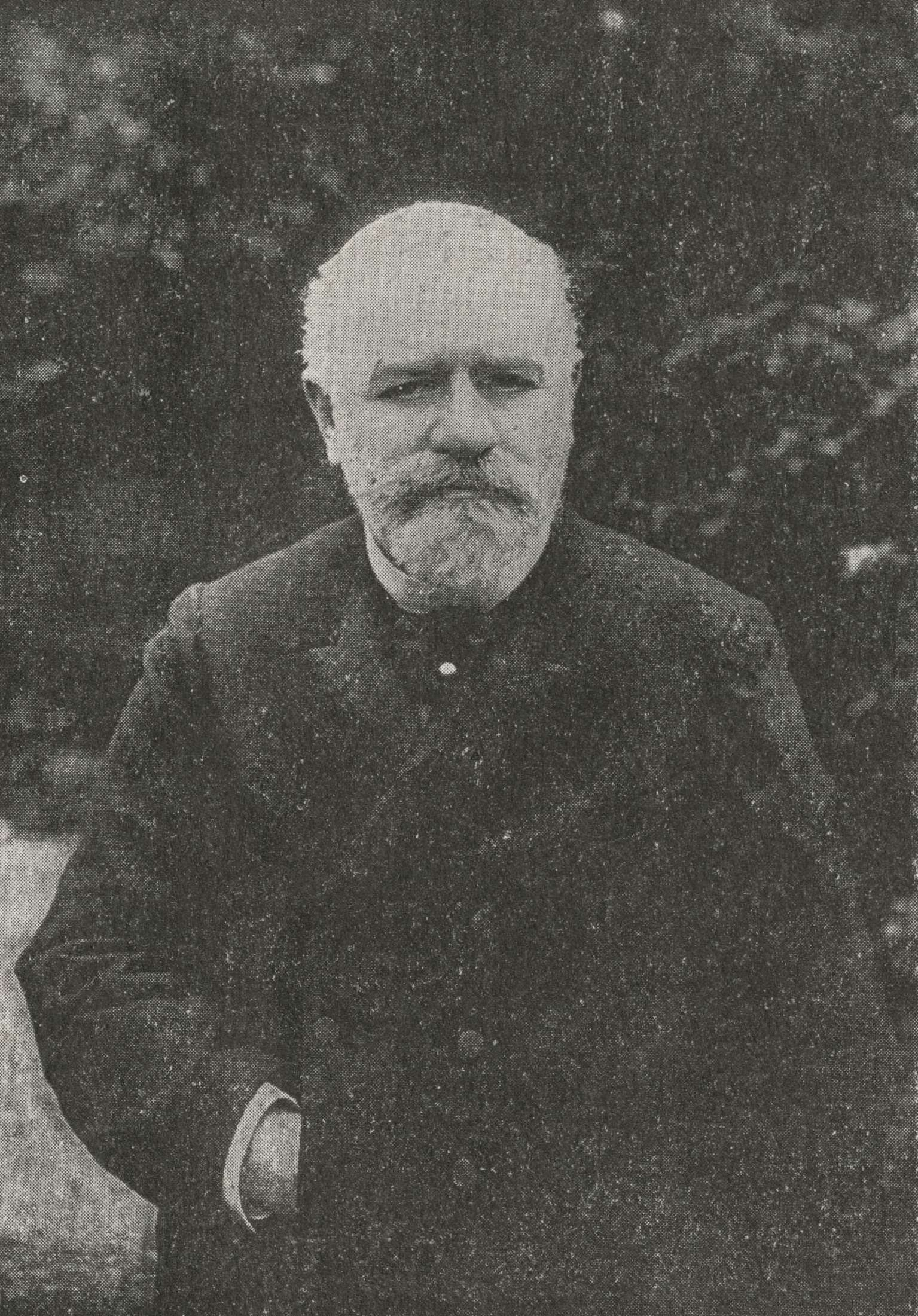 Ś. p. Jan Bloch